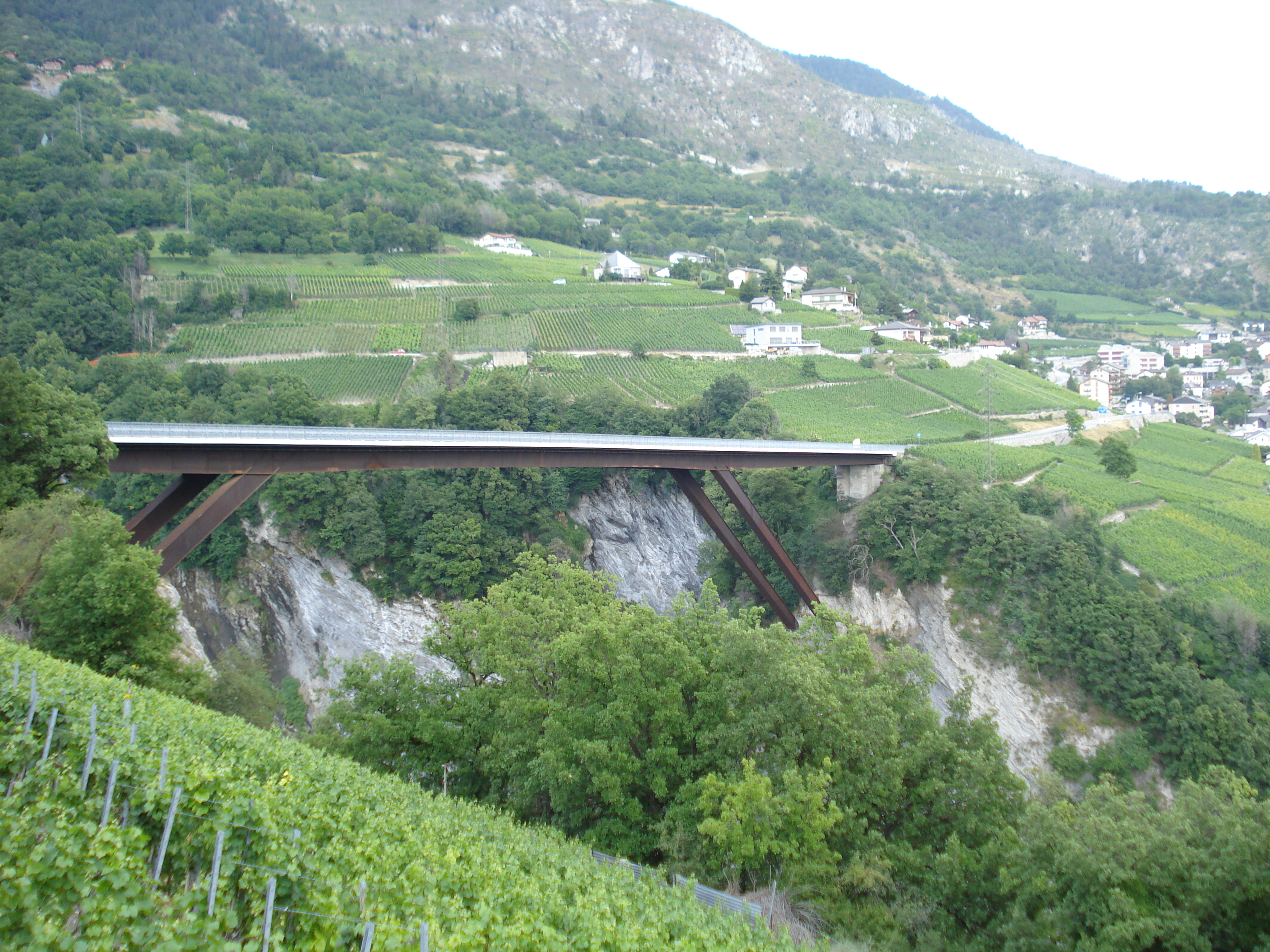 Brücke von Varen nach Leuk